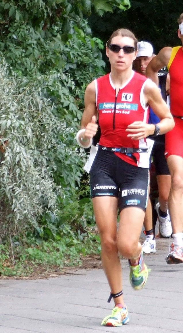 Andrea Brede beim Ironman in Frankfurt, 2007